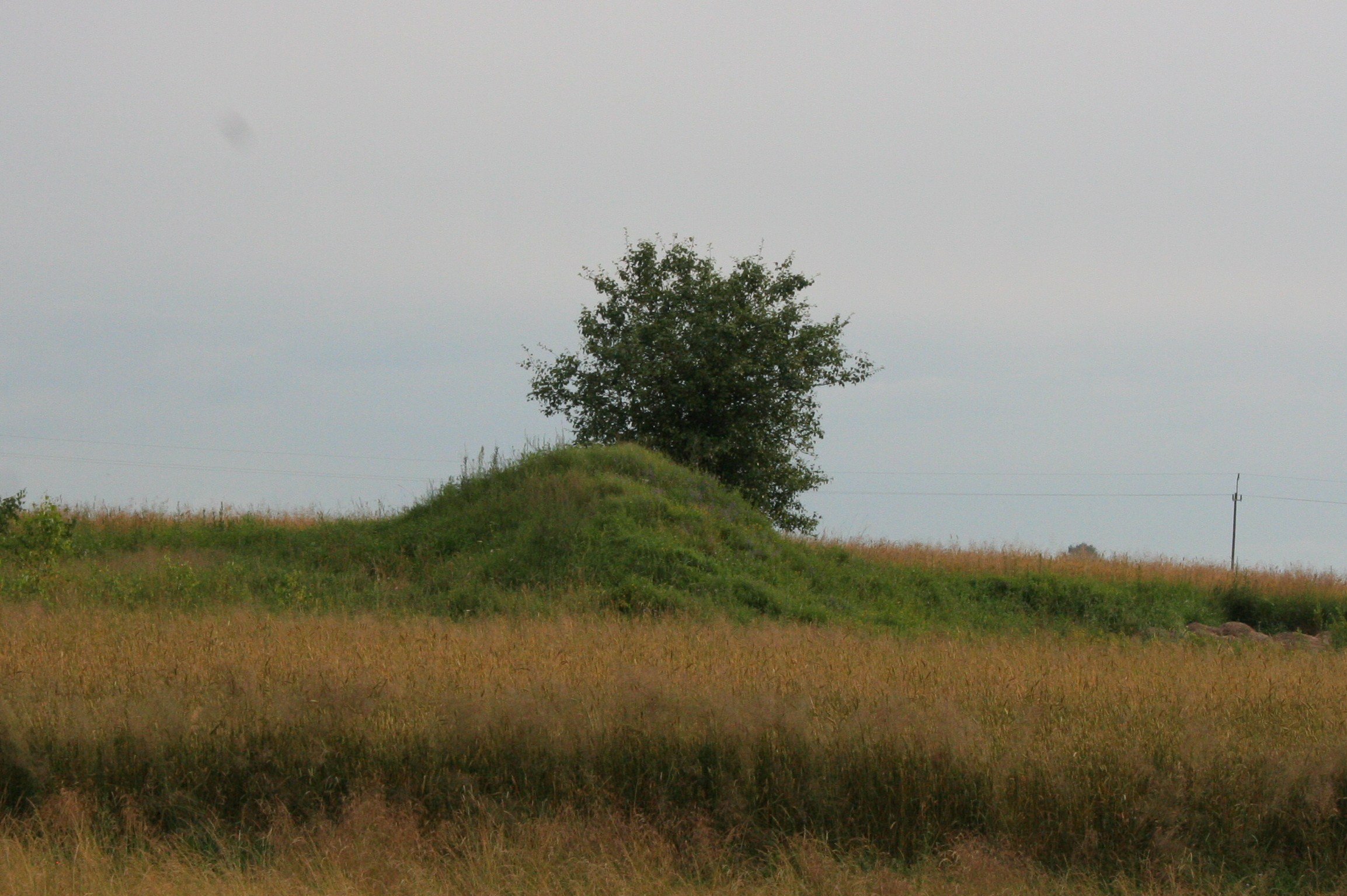 Kurhan "Kościa Górka" w Kamieniu.